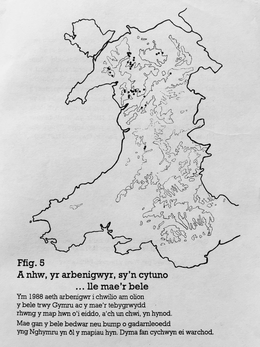 map yn dangos dosbarthiad olion bele coed go iawn i'w cymharu a chanlyniadau arolwg 1987